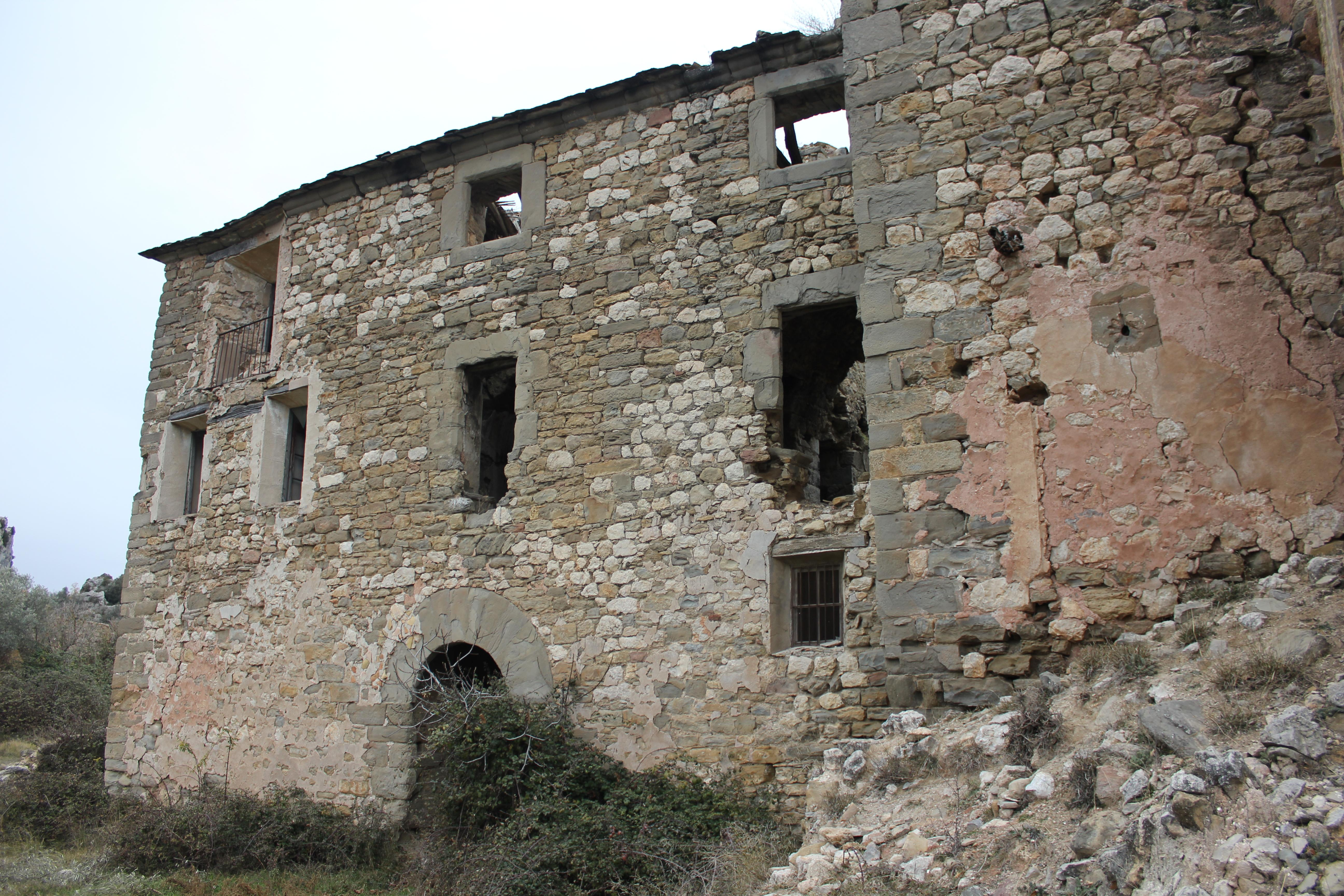 Aragonés: Casa a'l costau d'a ilesia en A Peniella (A Fueva, Sobrarbe).